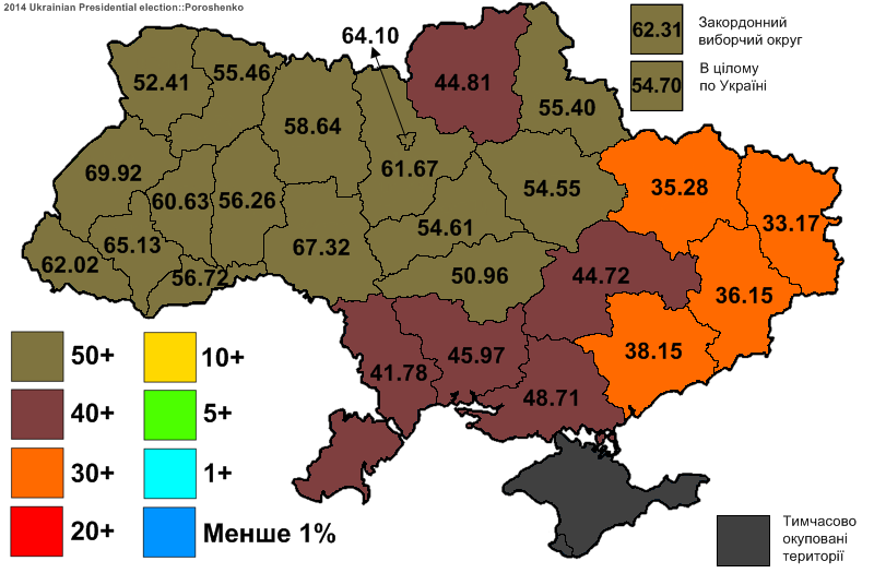 Електоральна підтримка Порошенка Петра Олексійовича на виборах Президента України 2014.